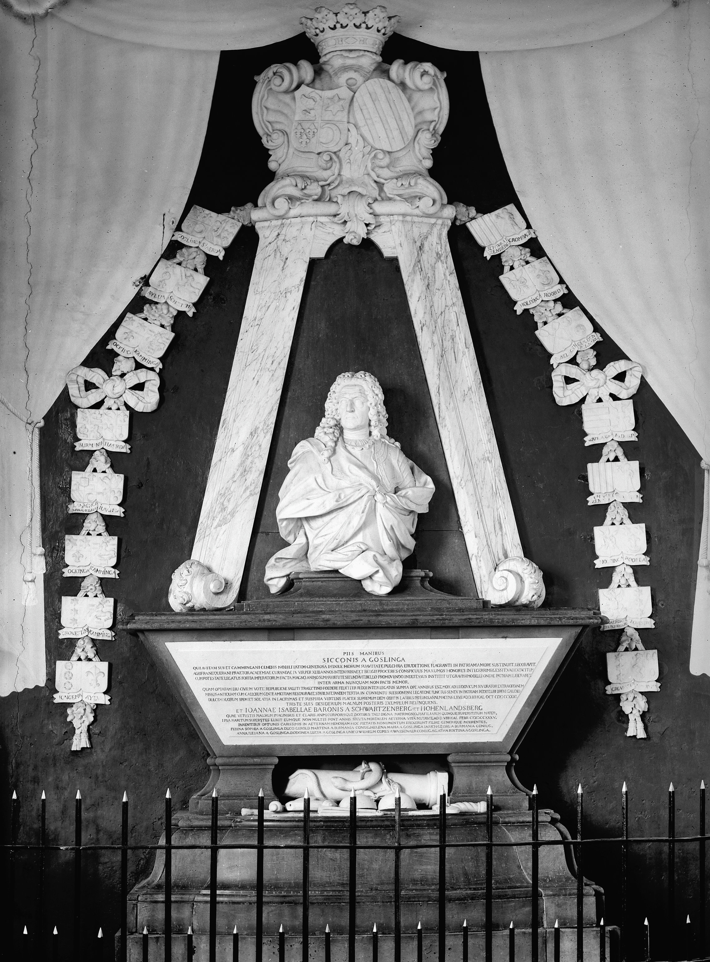 N.H.Kerk: grafmonument van J.B.Xavery, anno 1737